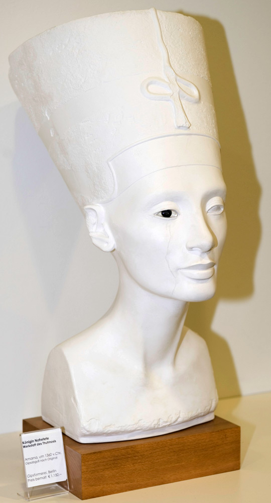 Königin Nofretete, Gipskopie, Gipsabguß nach Original, unbemalt, Der Preis für eine bemalte Kopie beträgt im Jahr 2009 € 1.150.-- , Gipsformerei Ausstellungsraum "Staatliche Museen zu Berlin" (Sophie-Charlotten-Straße 17/18, 14059 Berlin-Charlottenburg)